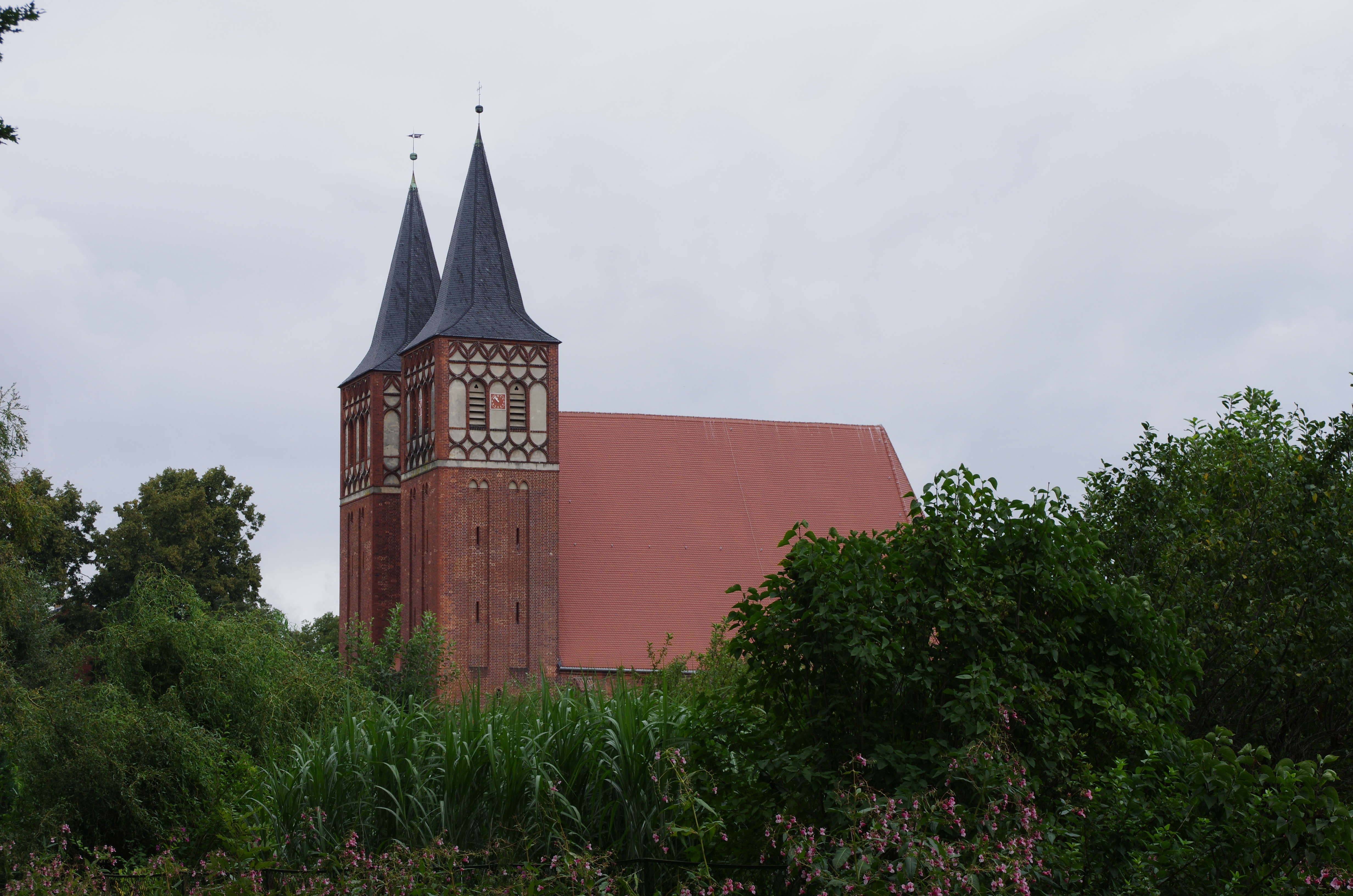 Baruth/Mark in Brandenburg. Die Kirche steht unter Denkmalschutz.